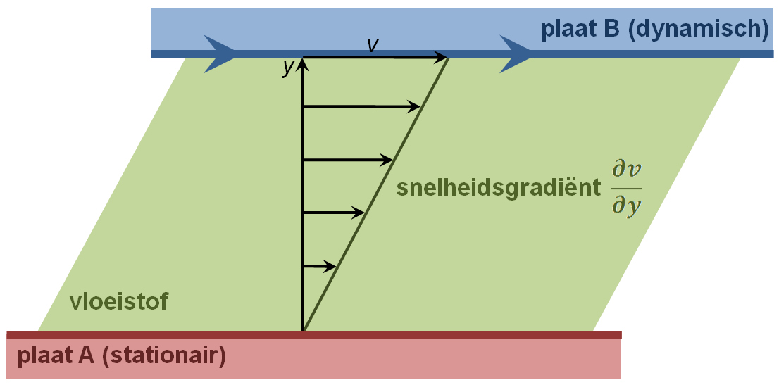 Viscositeit